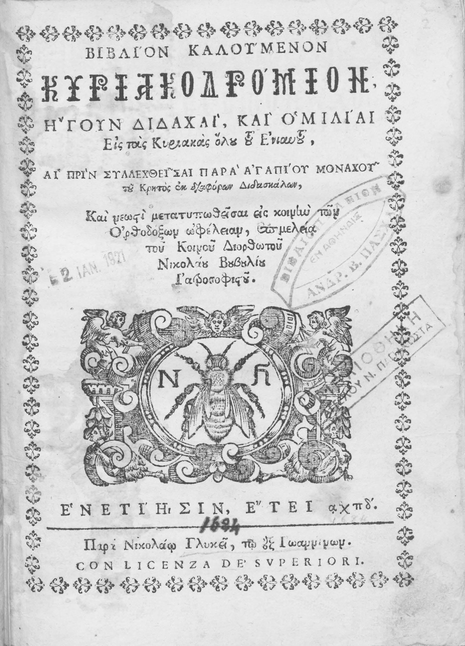 old greek book